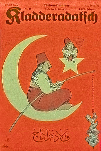 Türken-Nummer der Zeitschrift Kladderadatsch. Berlin, 68. Jahrgang, Nummer 44 (31. Oktober 1915) - Militärhistorisches Museum der Bundeswehr in Dresden